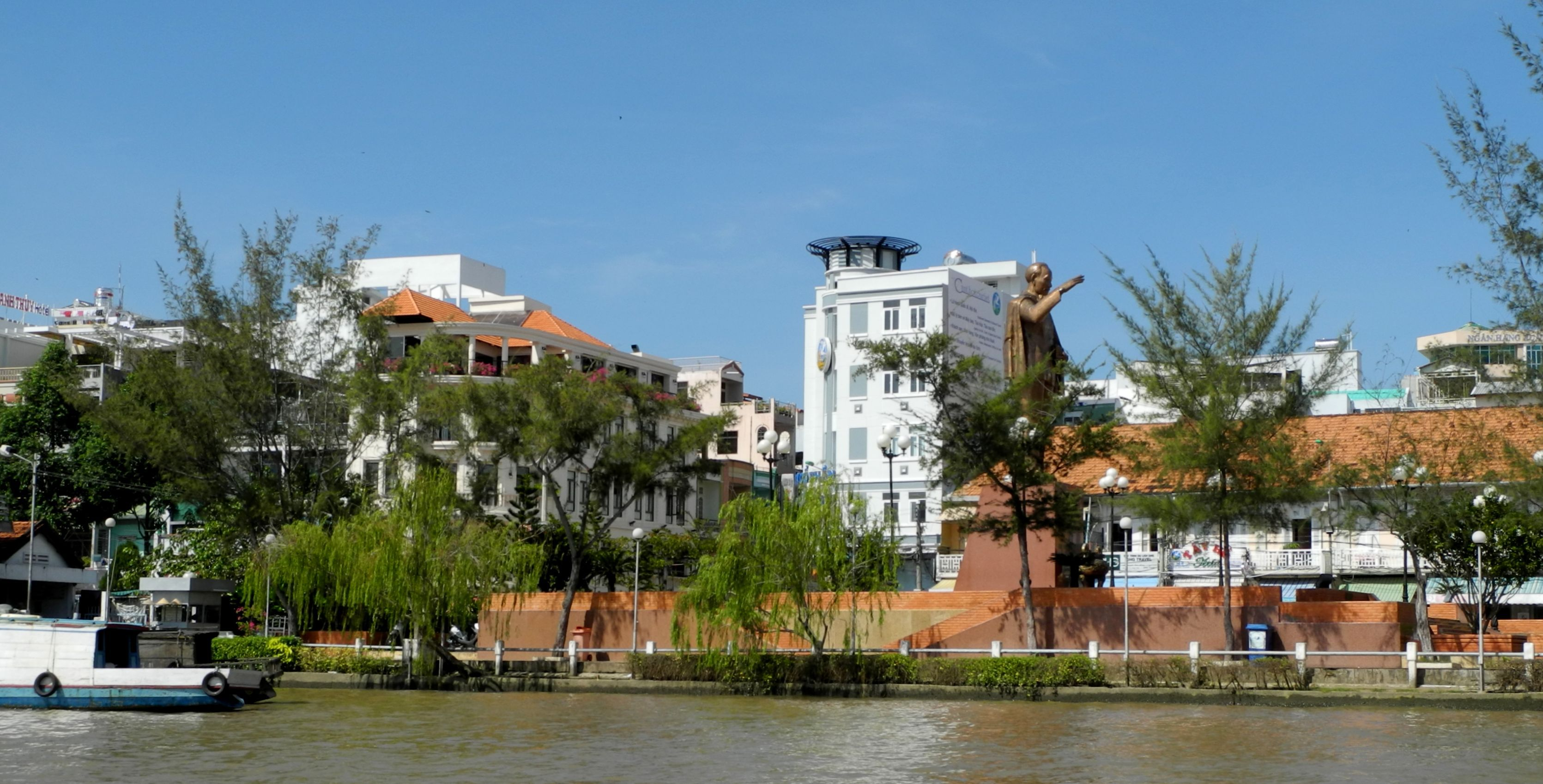 Can Tho City-Stadt aus Sicht vom Boot